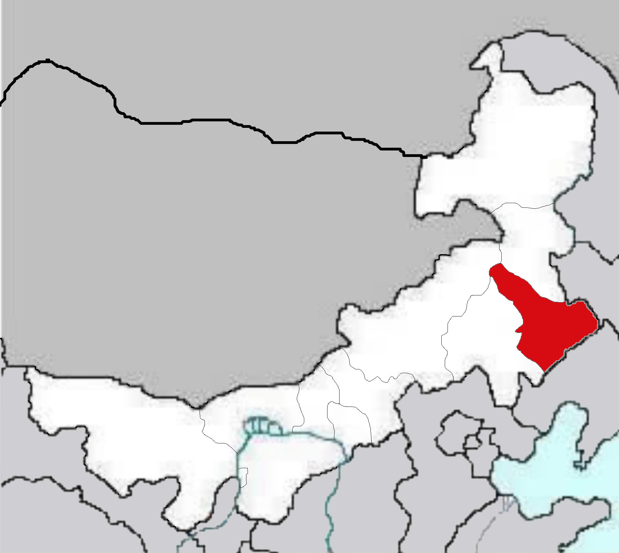 Inner Mogolia Maps